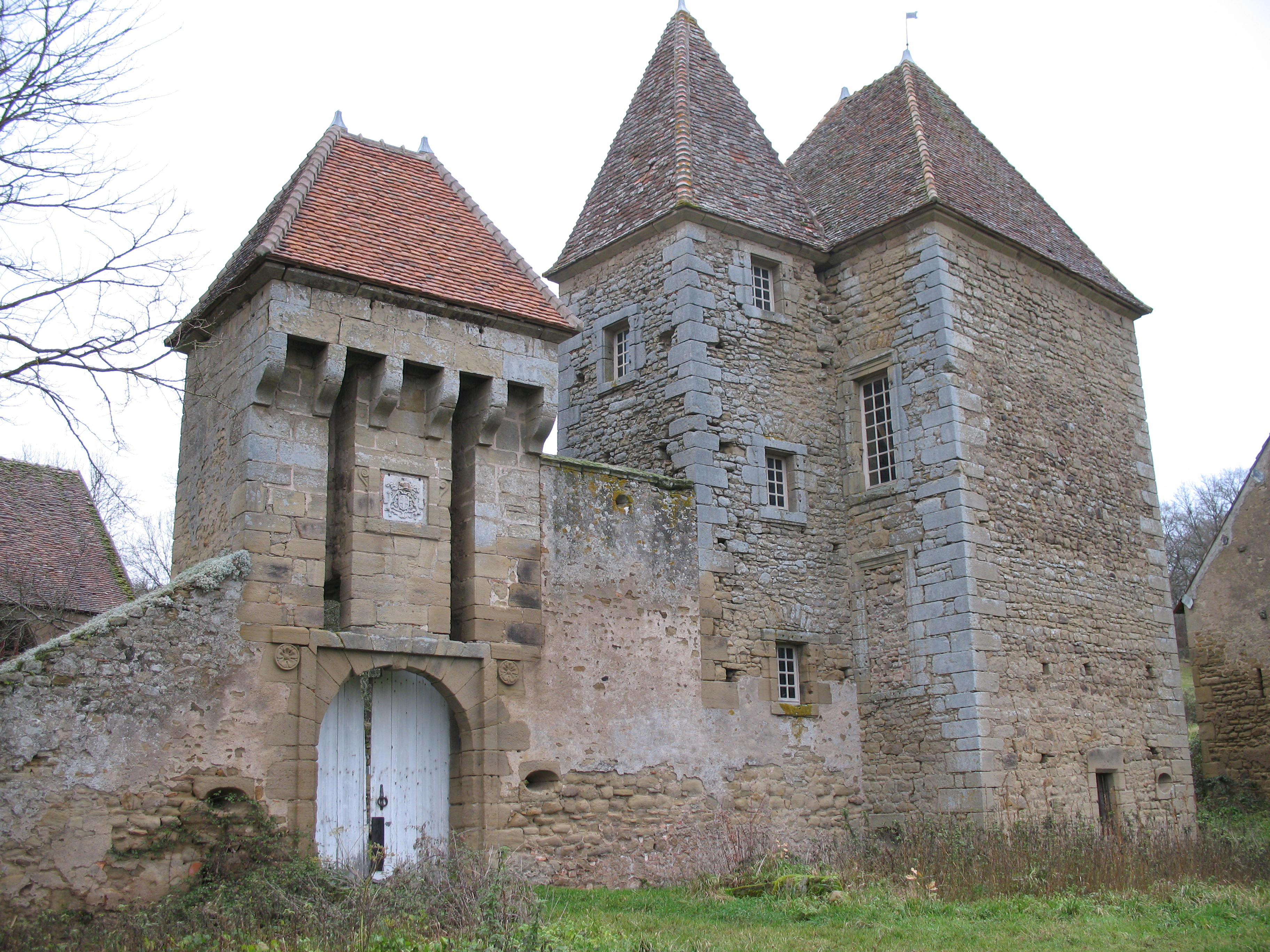 Le château de Champsigny à Saint-Léger-du-Bois (Saône-et-Loire)